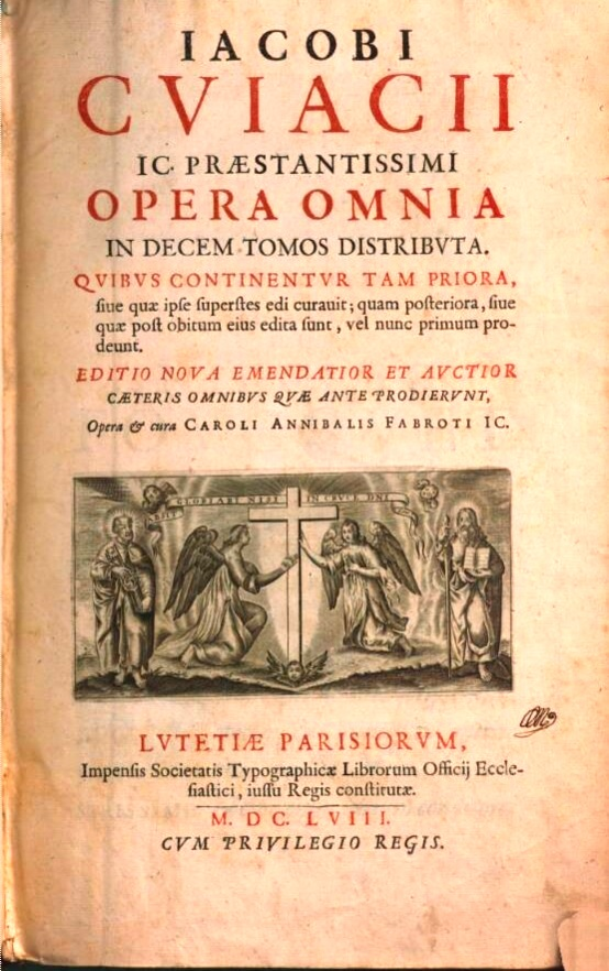 Portada de l'obra "Opera omnia in decem tomos distributa. Tomus primus (operum priorum)" de Jacques Cujas. Lutetiae Parisiorum (París): Impensis Societatis Typographicæ Librorum Officij Ecclesiastici, 1658.